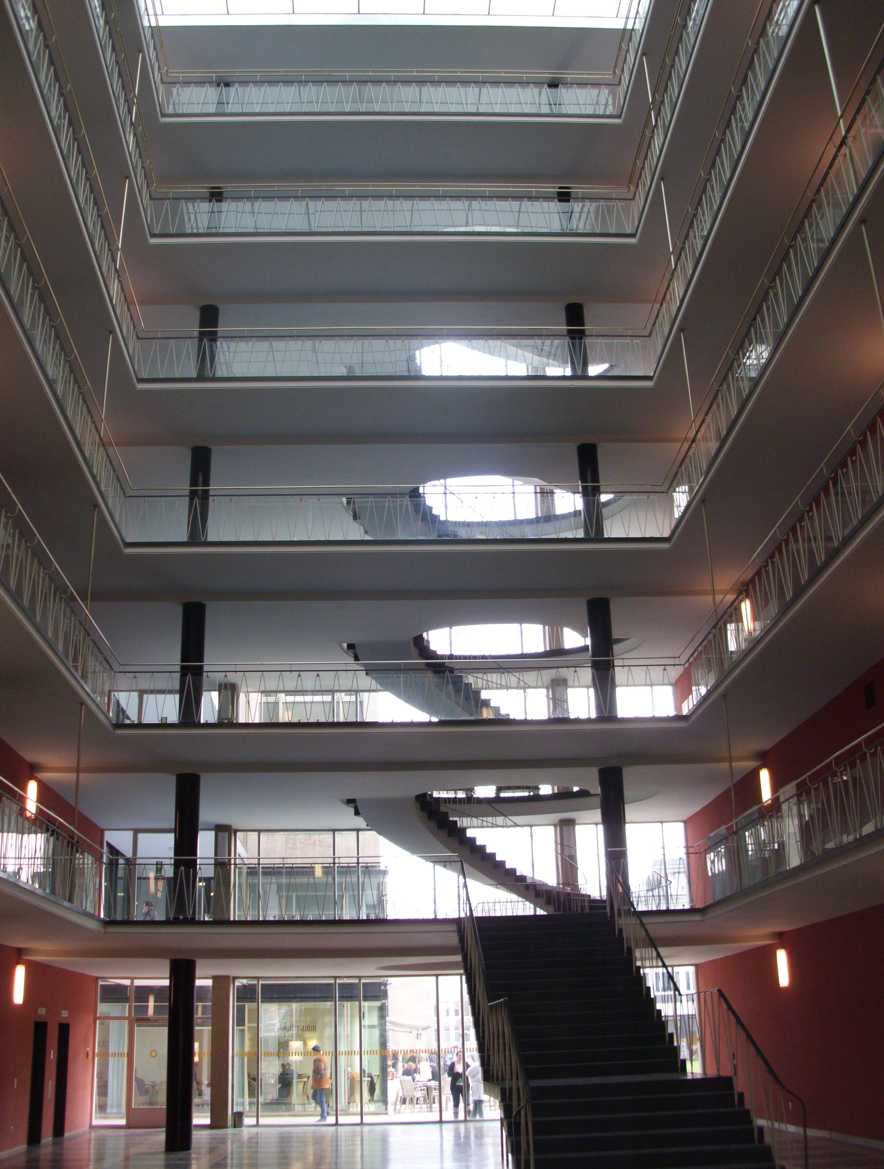 Geschwungene Treppe mit Glasdach im Justizgebäude